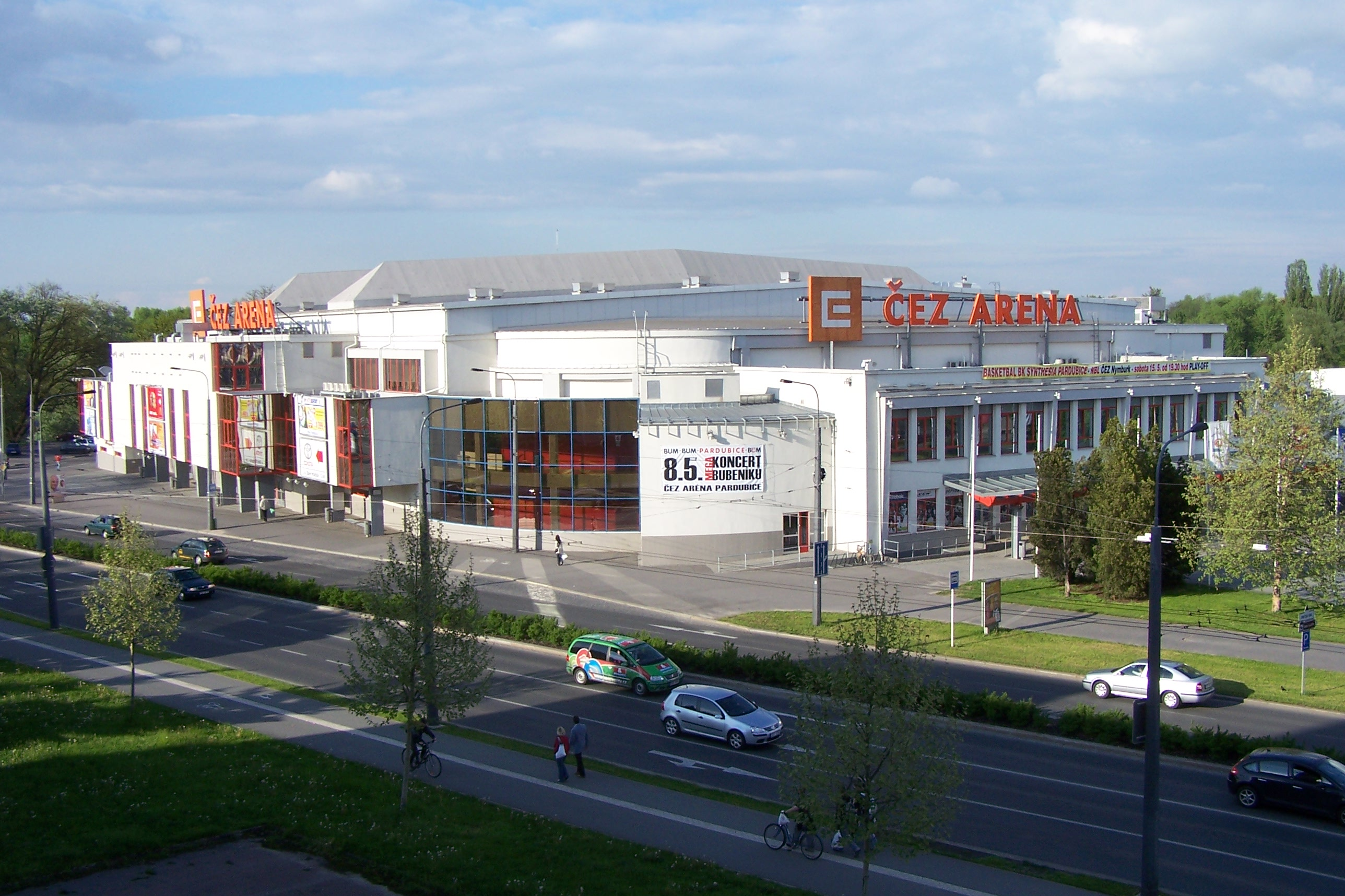 ČEZ Aréna v Pardubicích